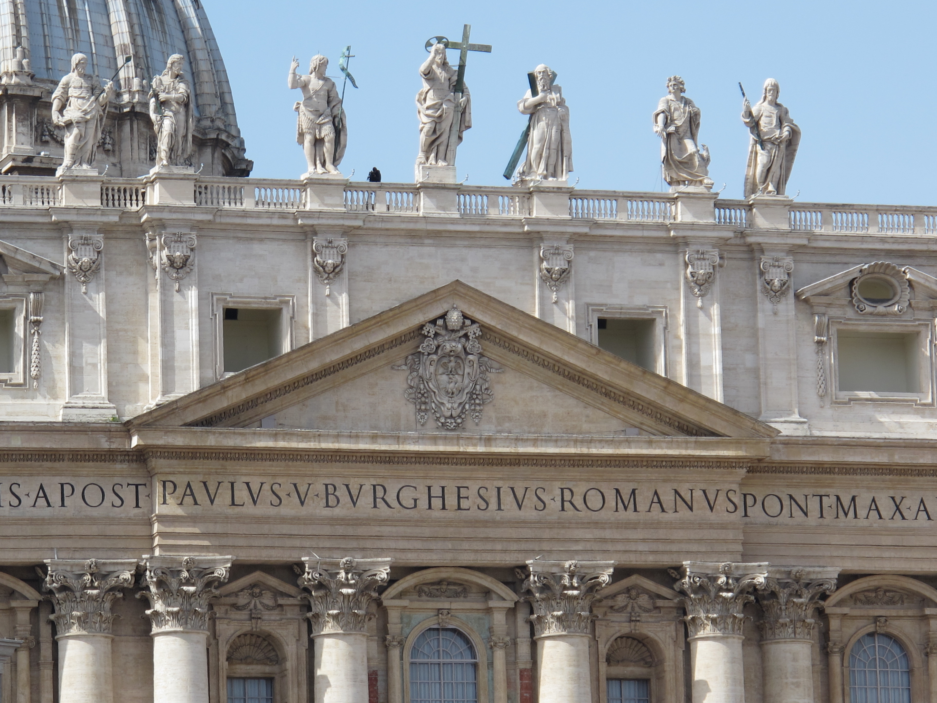 San pietro, stemma borghese